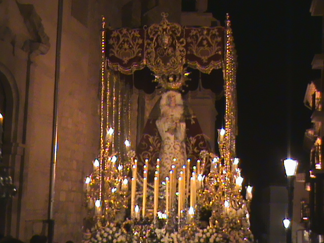 Virgen del Consuelo Antequera